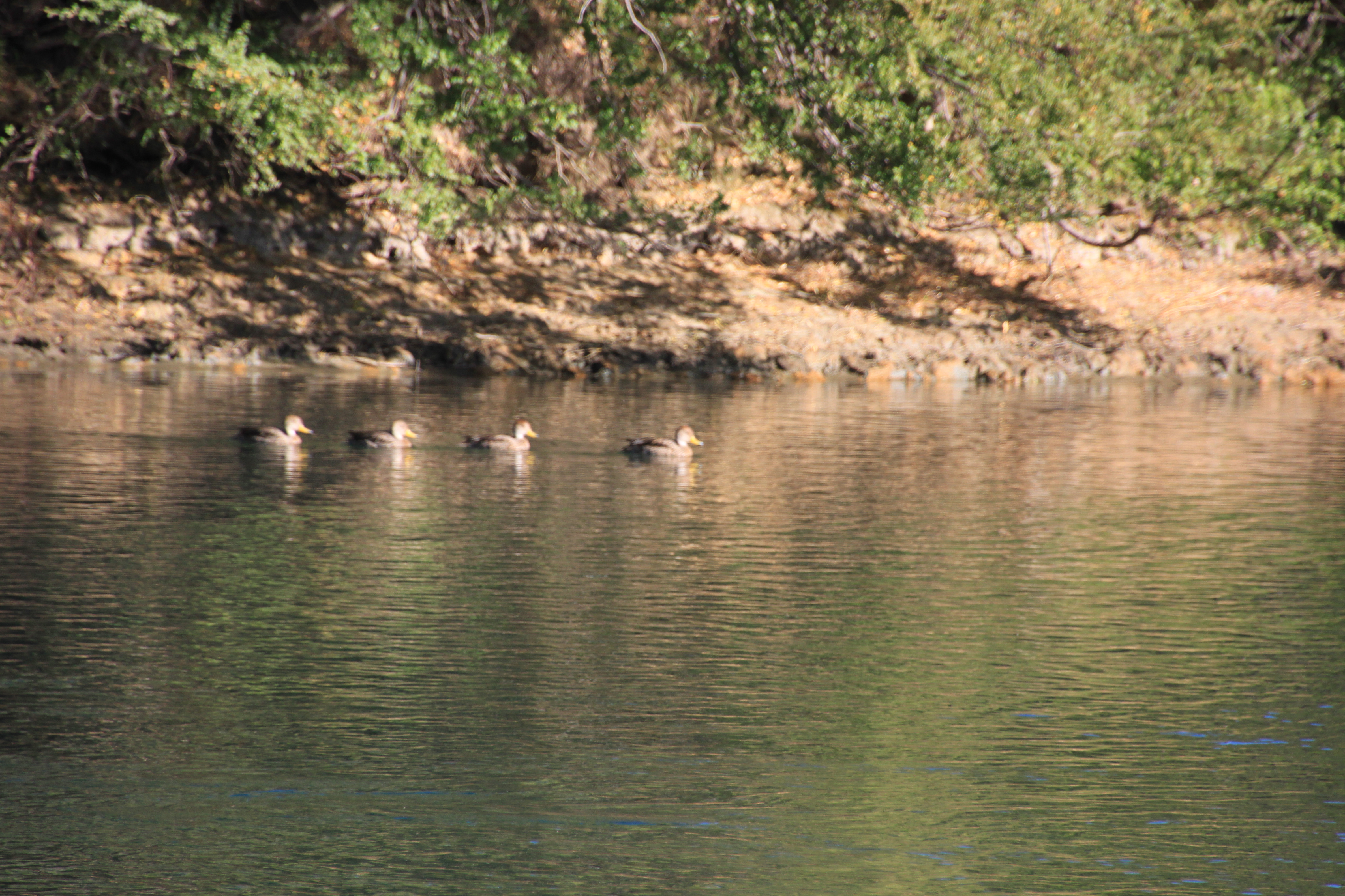 Este es el río Carrileufú, uno de los ríos de la Patagonia Argentina que desemboca en el lago Rivadavia